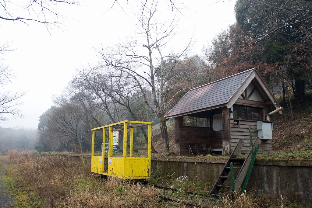 高千穂鉄道深角駅